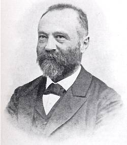 Giuseppe Antônio Lorenzoni,início século XX.